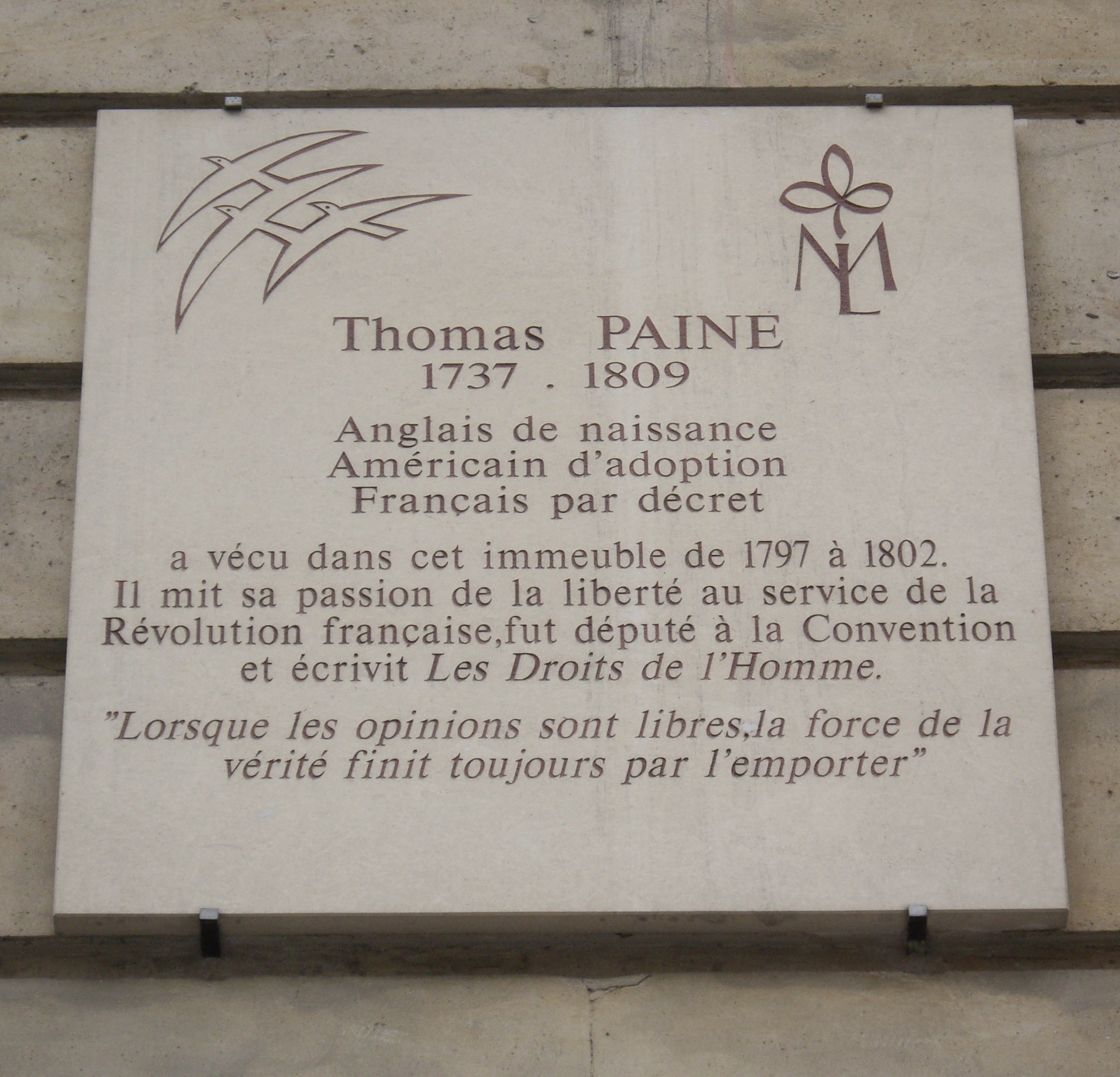 Plaque apposée au n° 10 de la rue de l'Odéon, Paris 6e :Thomas Paine1737-1809Anglais de naissanceAméricain d'adoptionFrançais par décreta vécu dans cet immeuble de 1797 à 1802. Il mit sa passion de la liberté au service de la Révolution française, fut député à la Convention et écrivit Les Droits de l'Homme.« Lorsque les opinions sont libres, la force de la vérité finit toujours par l'emporter. »